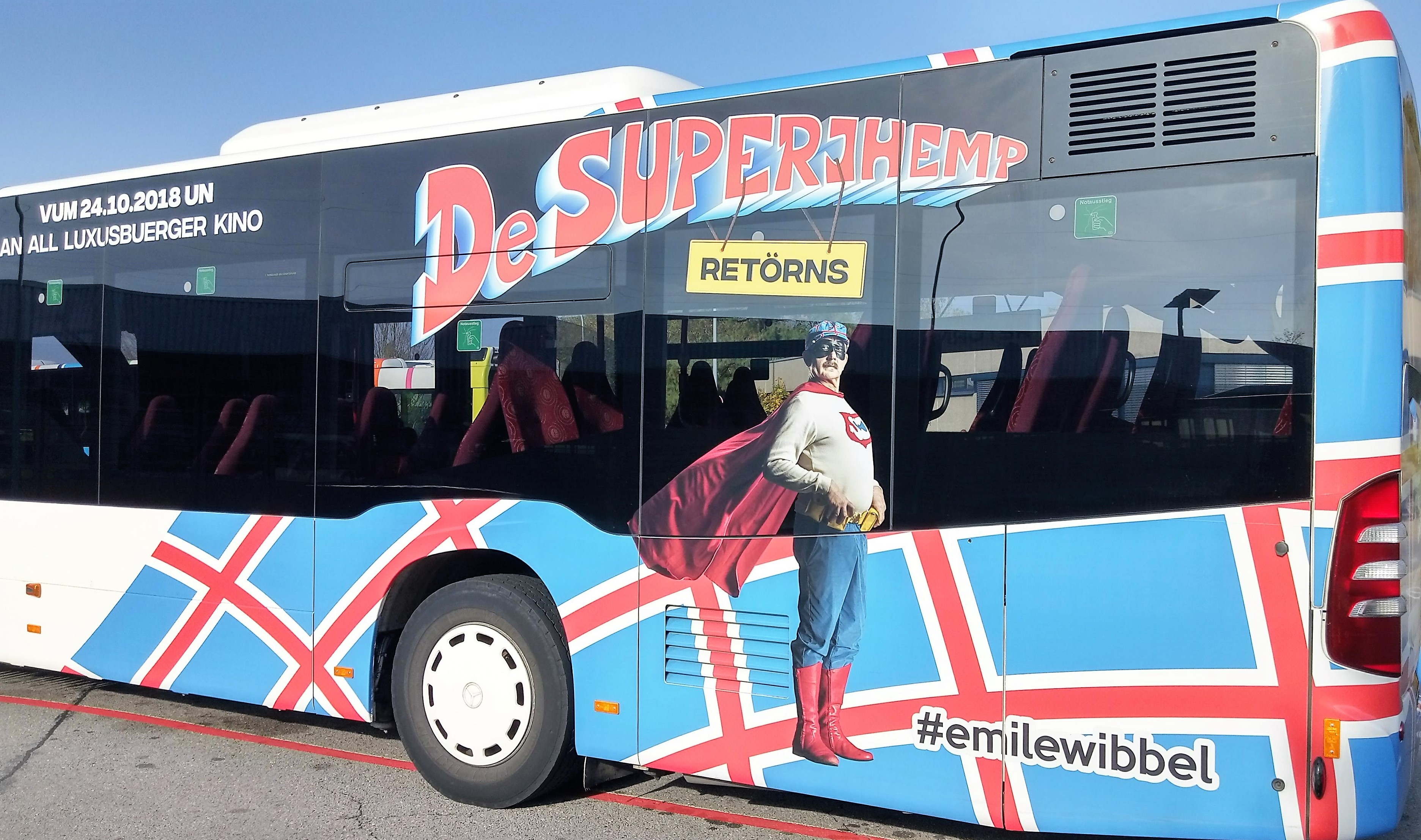 E Bus vun "Emile Wibbel" am Design vum Film "De Superjhemp retörns".